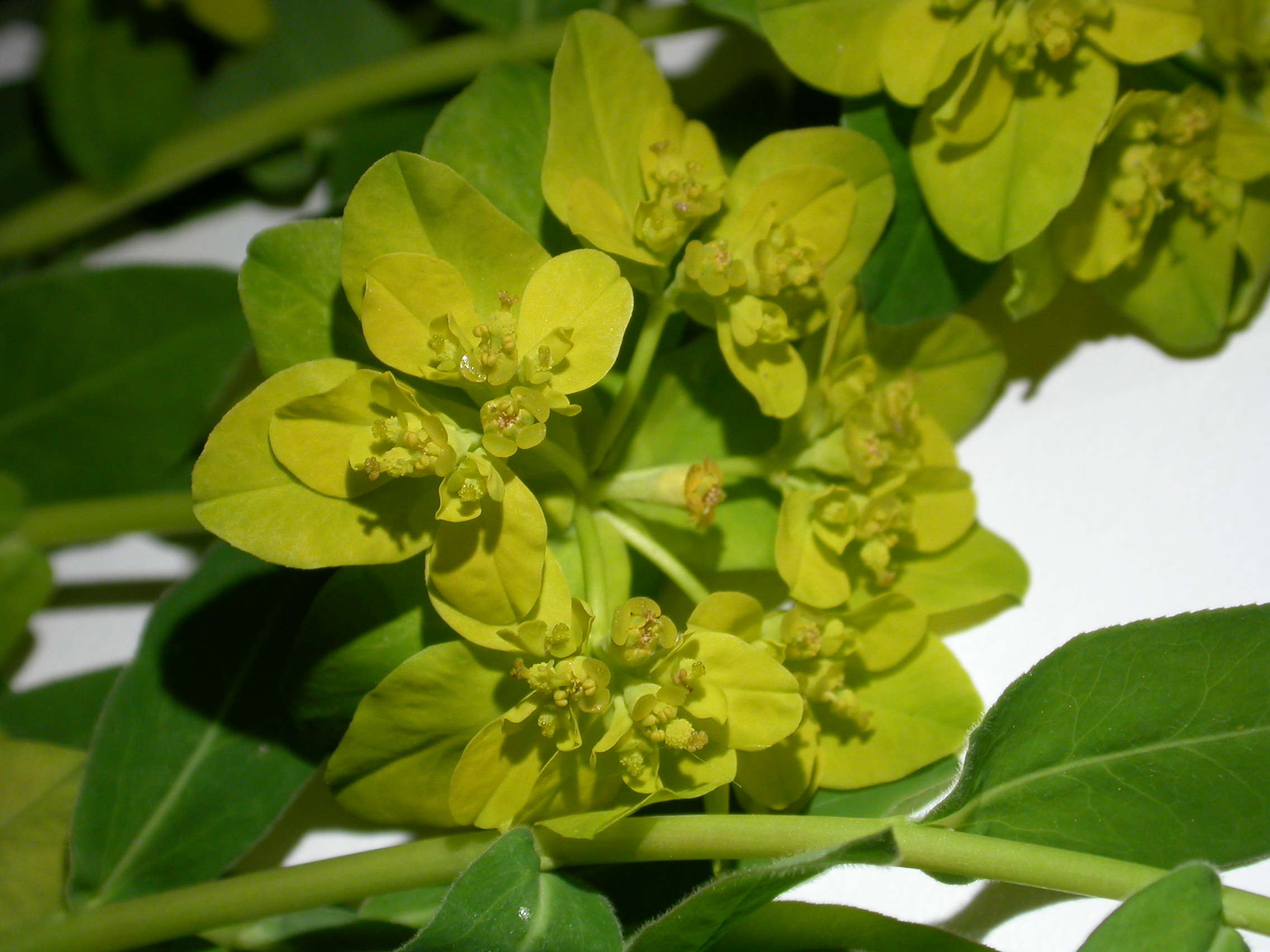 Euphorbia flavicoma-subsp-verrucosa Fresnes-au-Mont (Meuse), France